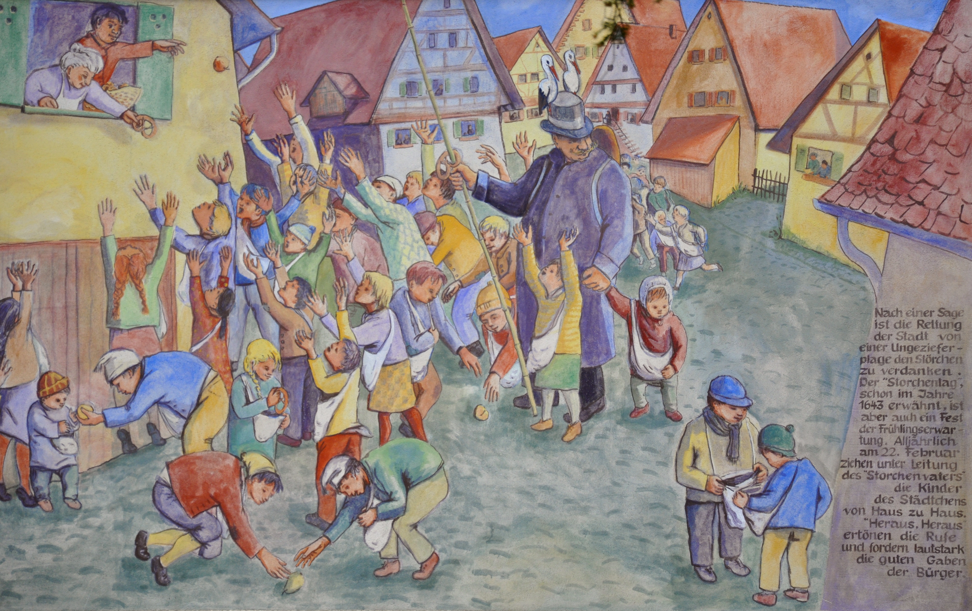 Haslach im Kinzigtal, Wandbild zum „Storchentag“, signiert „F. Haser“, 1989